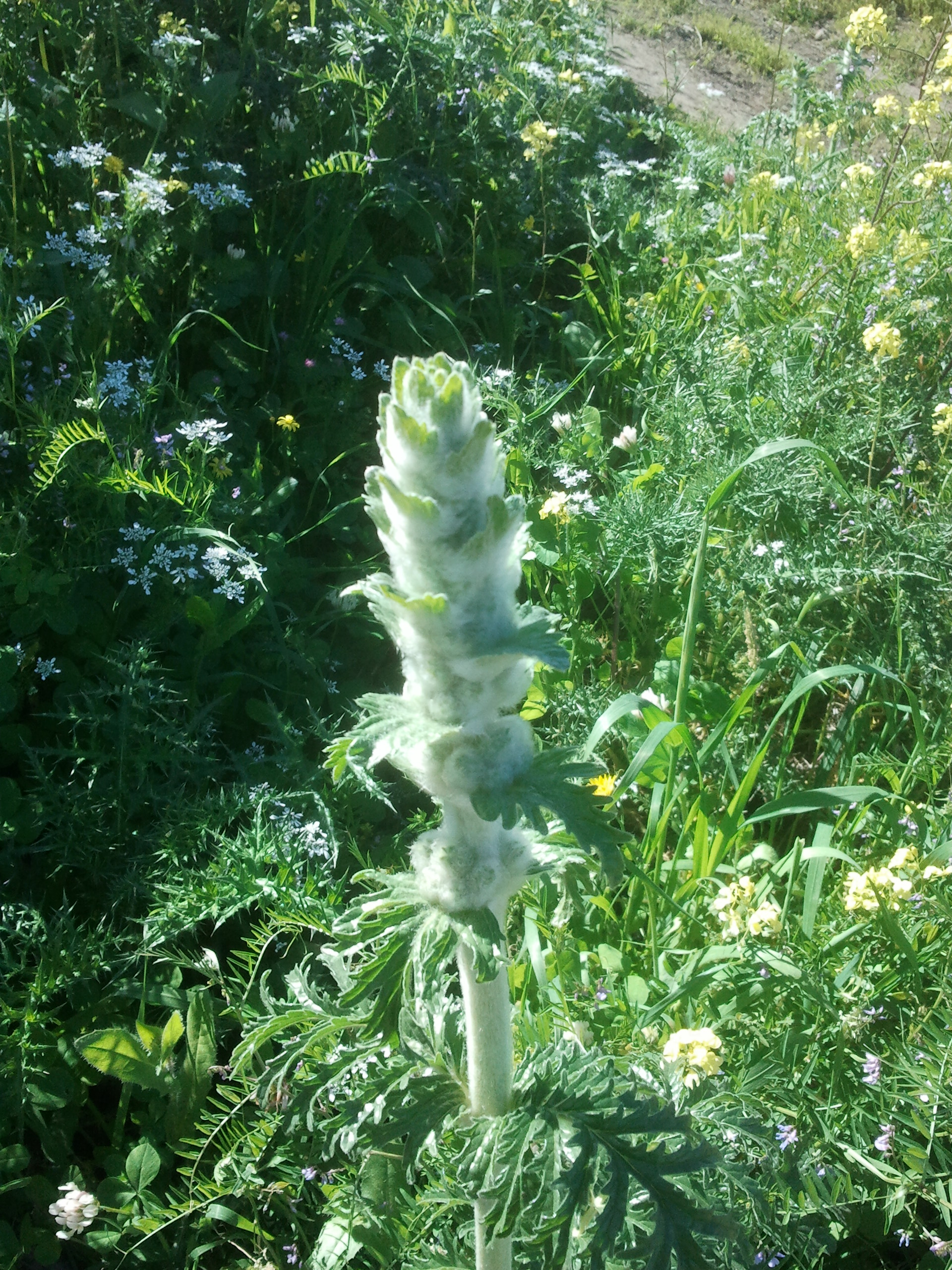 צמר מפוצל, צמח רב שנתי ממשפחת השפתניים. צולם בנחל מחניים ברמת כורזים ליד עין ירדה